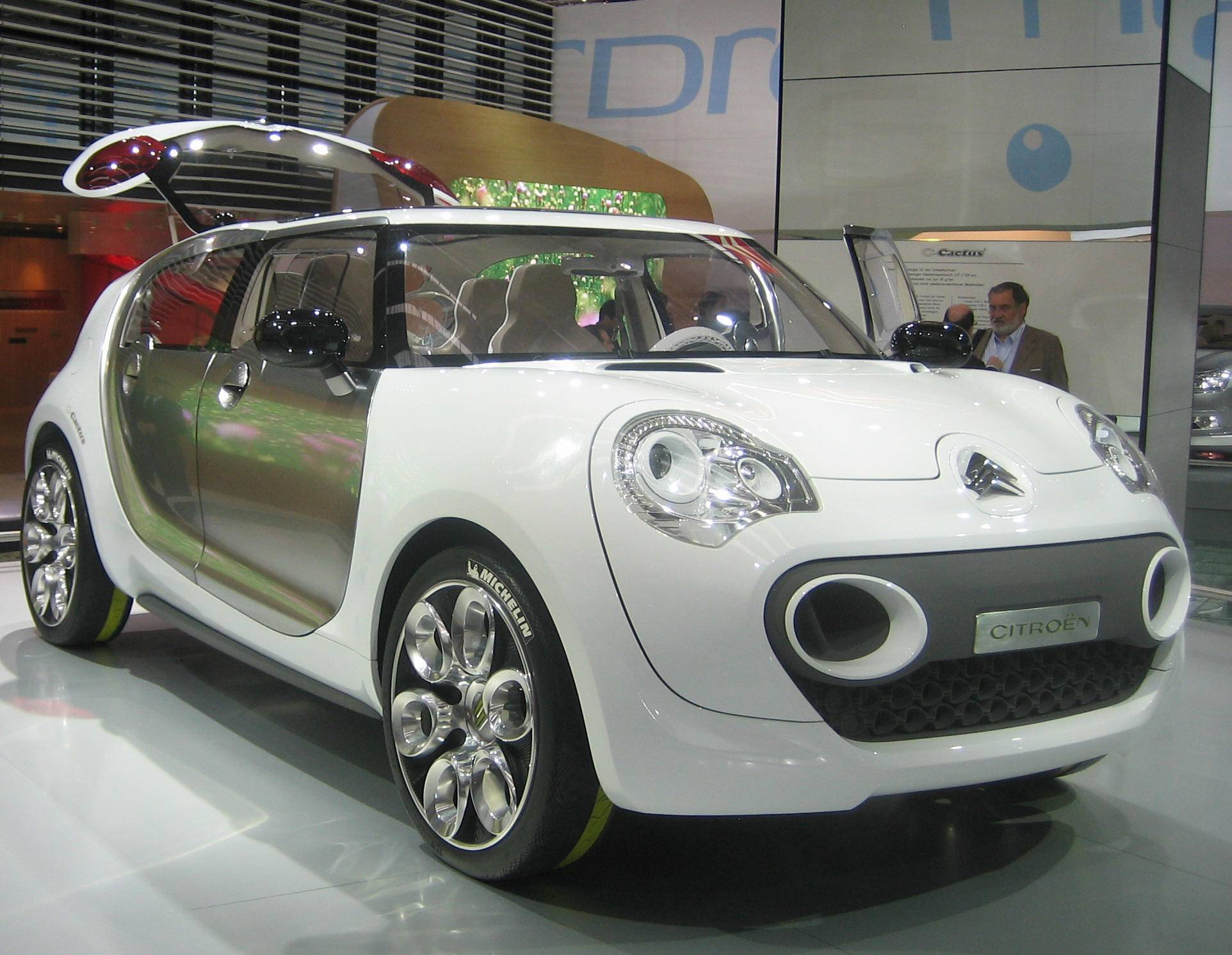 Citroen C-cactus